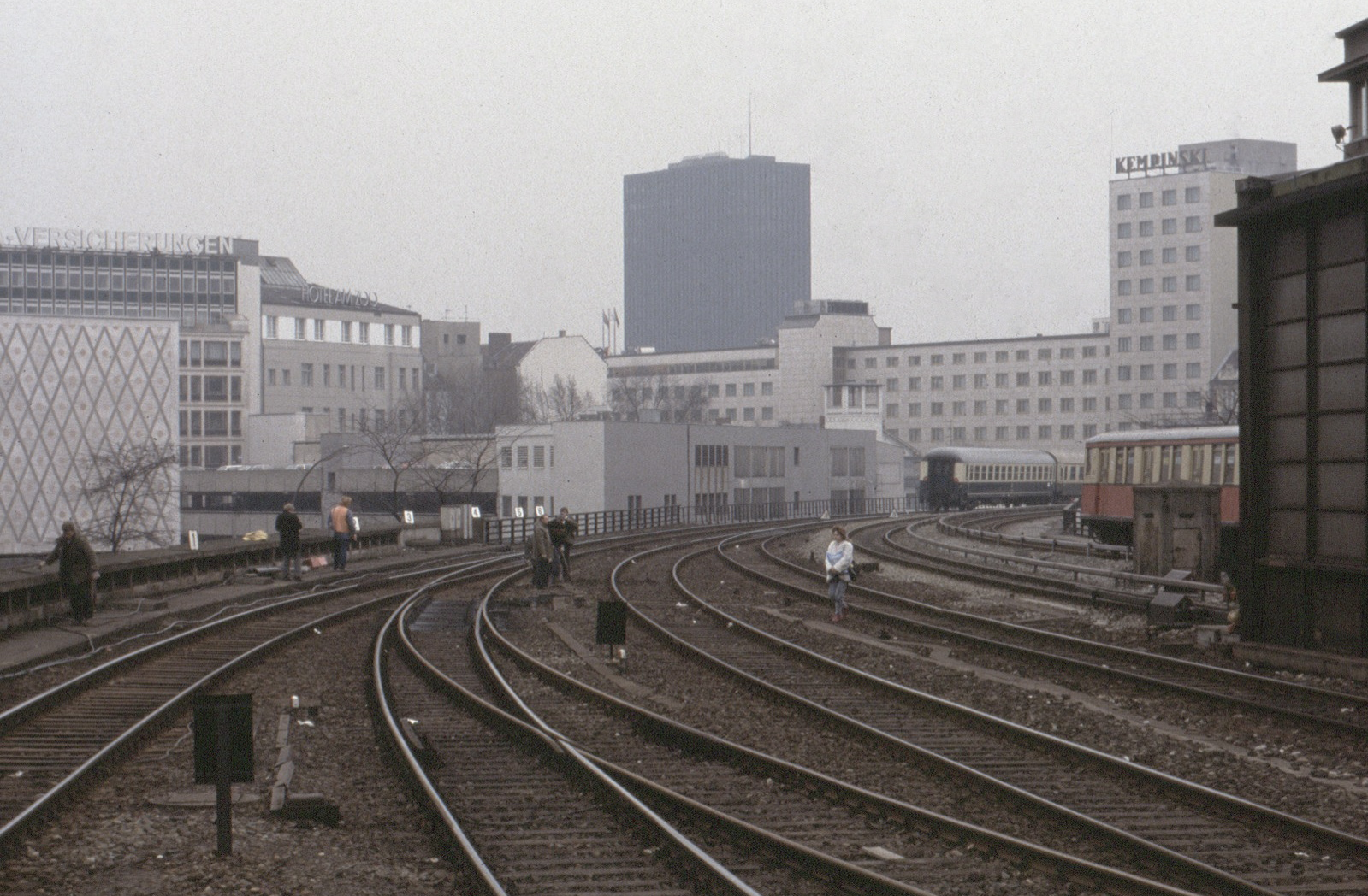 Bahnhof Berlin ZoologischerGarten, Westkopf